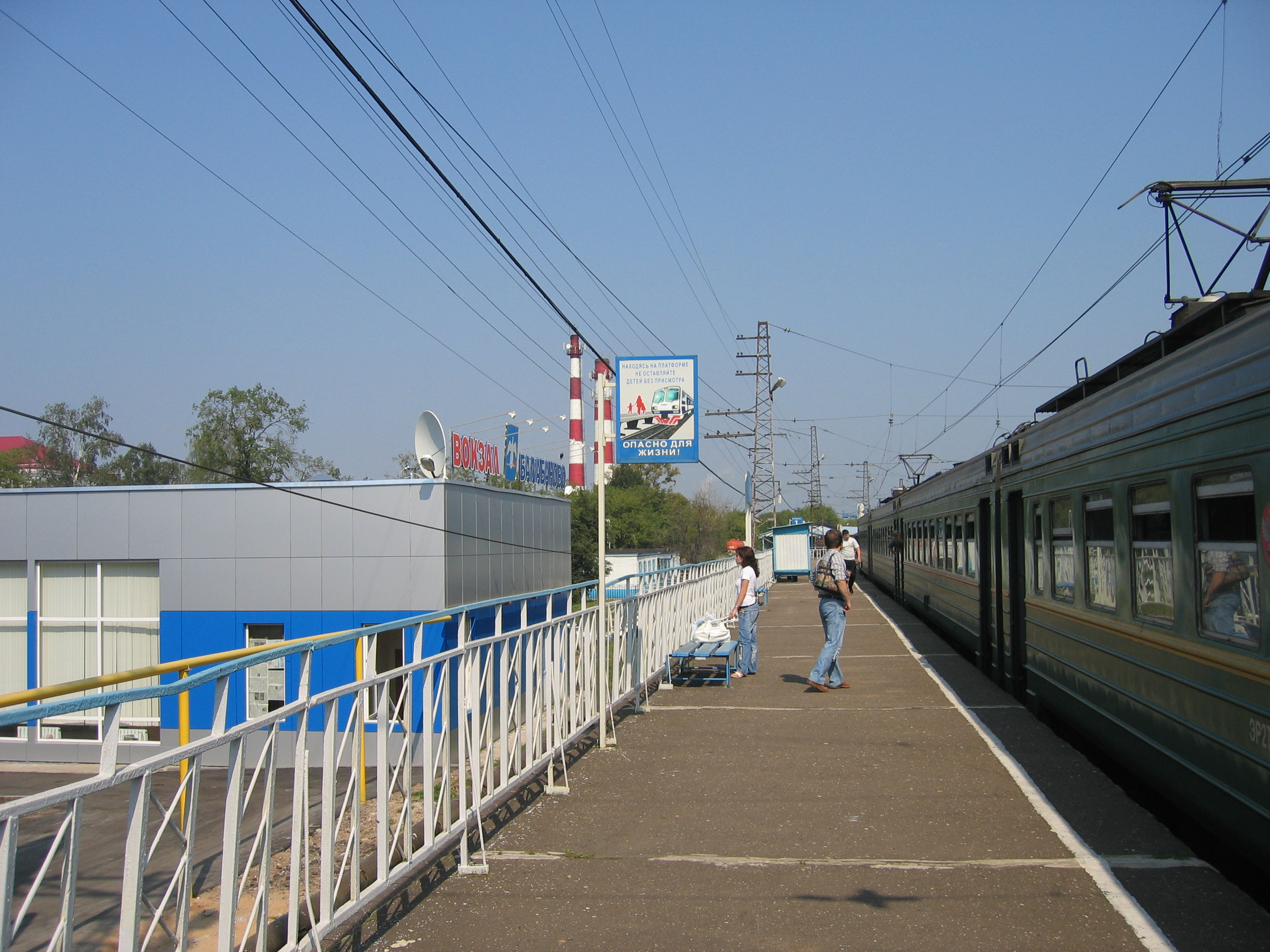 Bahnhof Balabanowo, Russland